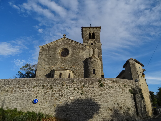 Église Saint-Pierre